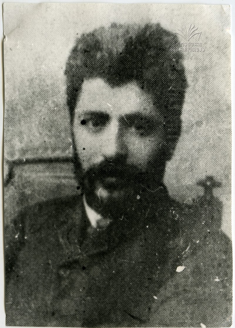 გიორგი ალექსანდრეს ძე ტარსაიძე